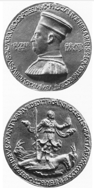 Seitenprofil des oben genannten P.d.P./recto eine Darstellung aus der Prometheus-Sage